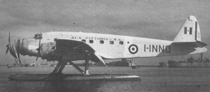 Savoia Marchetti SM.87 idro a Brindisi